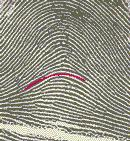 Daktiloskopia - Arch